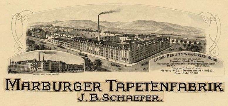 Werkfoto